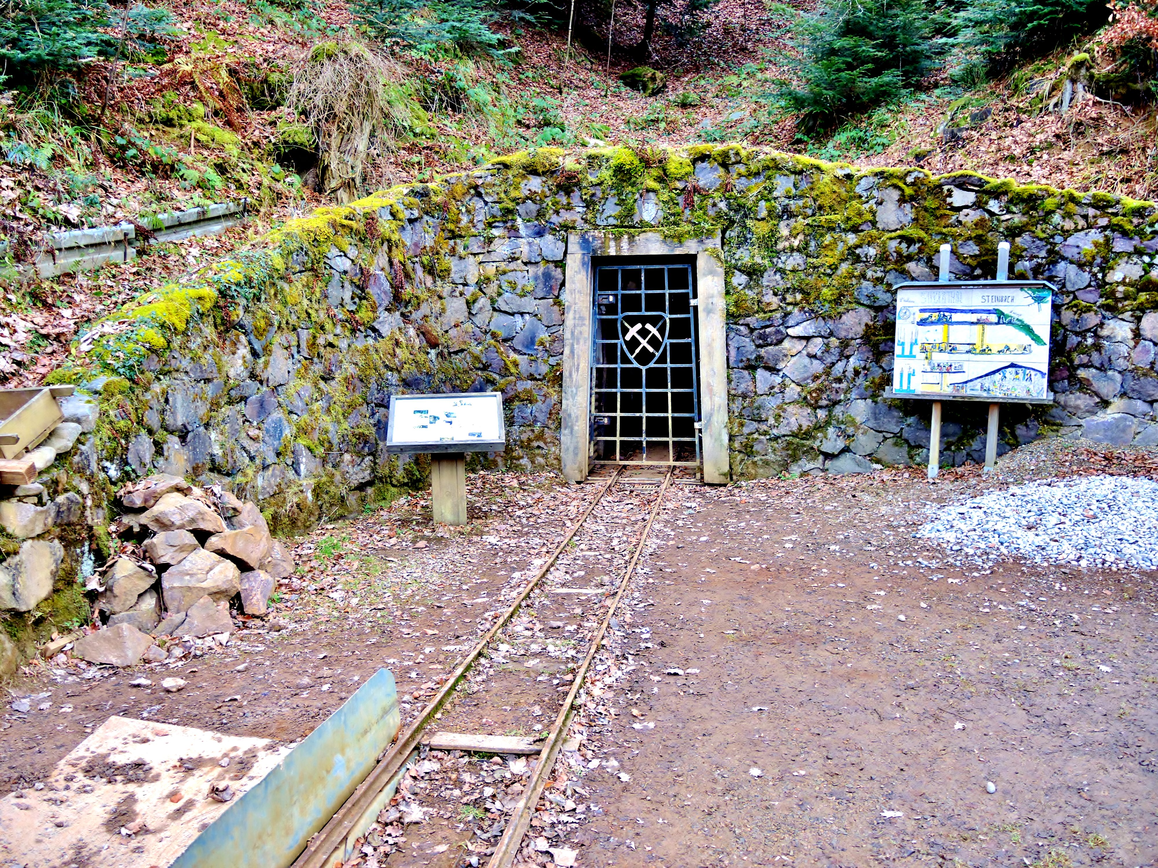 Steinbach. Entrée de l'ancienne mine de plomb-argentifère saint Nicolas